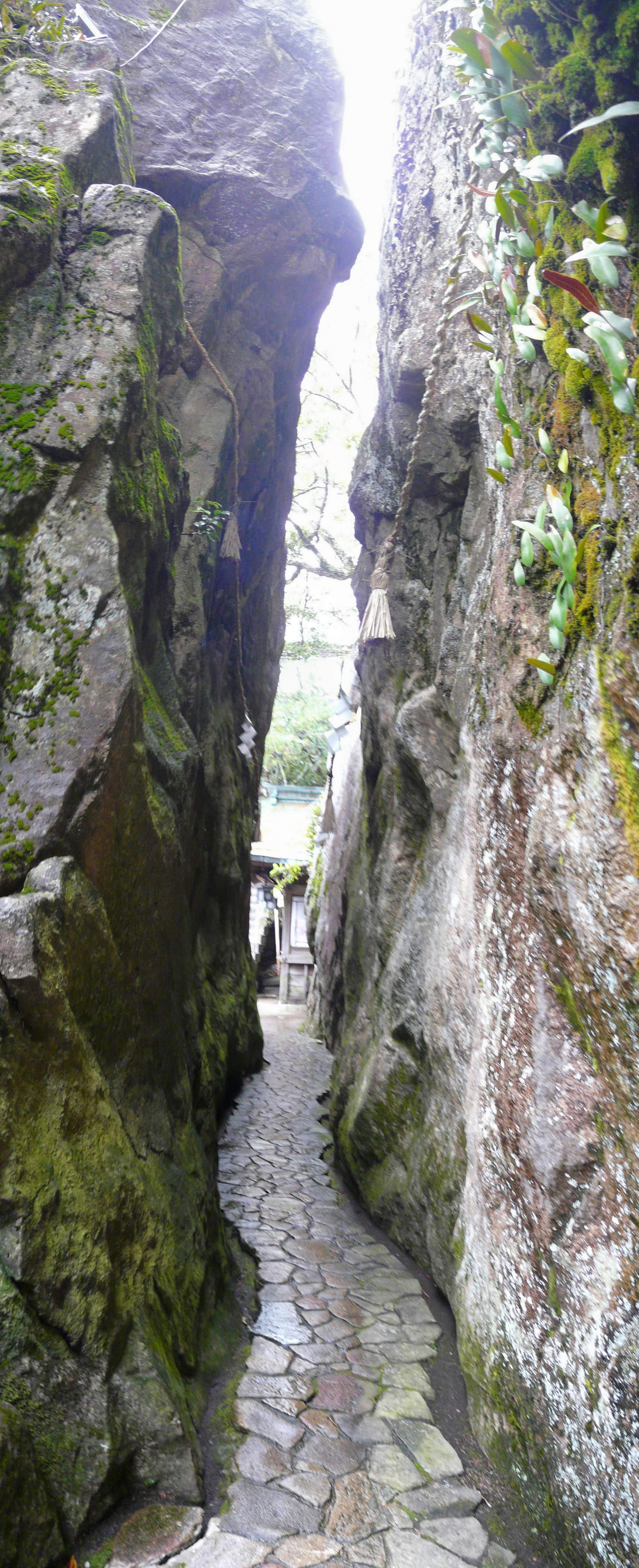 阿賀神社（太郎坊宮）の夫婦岩です。神様のお力によって押し開かれたと伝わる大岩で、隙間は最大で80cm程度で、参道の一部となっています。